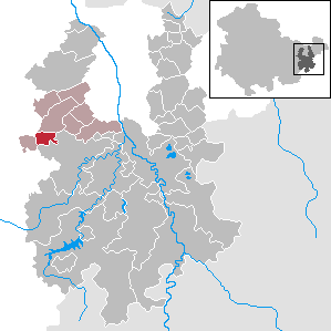 Lederhose in Thuringia - District Greiz